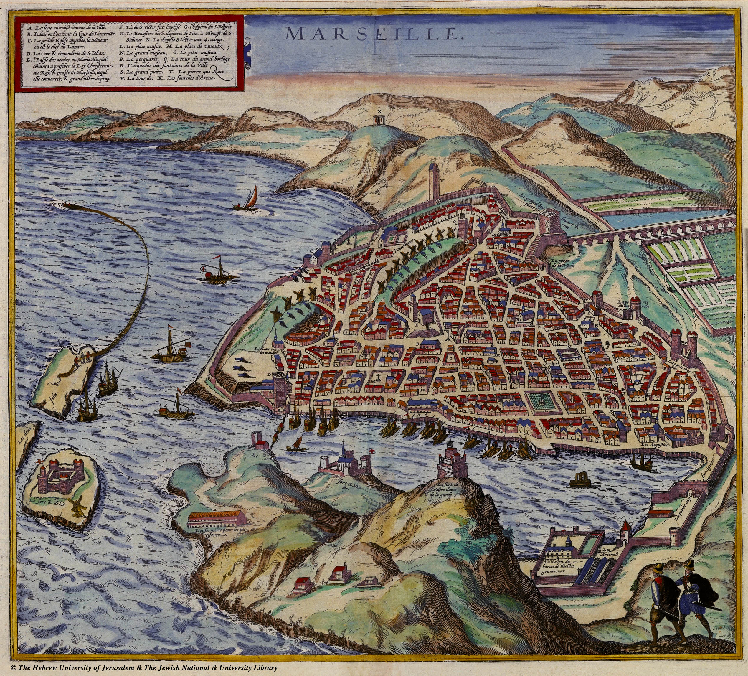 Plan de Marseille en 1575, Braun and Hogenberg, Civitates Orbis Terrarum, II-12